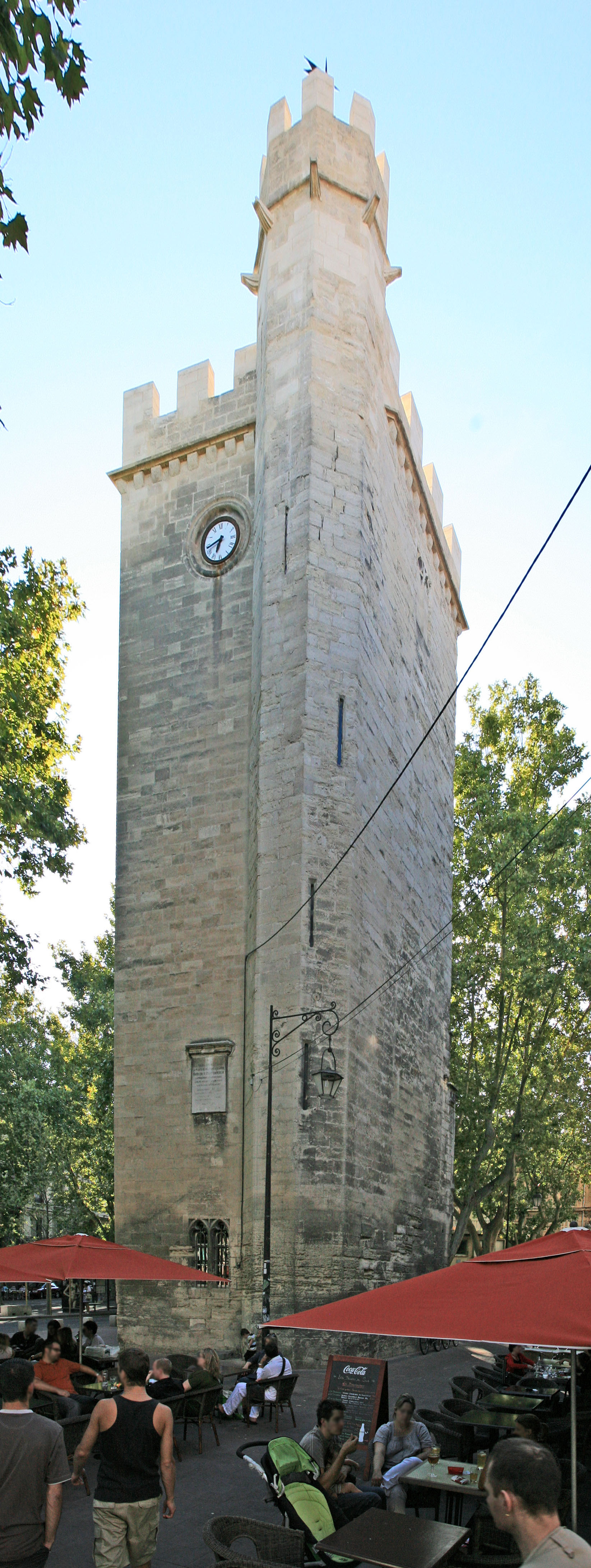 Ancienne Chapelle des Templiers (Livrée du cardinal Corsini, dite Livrée de Florence), Avignon, Vaucluse, France